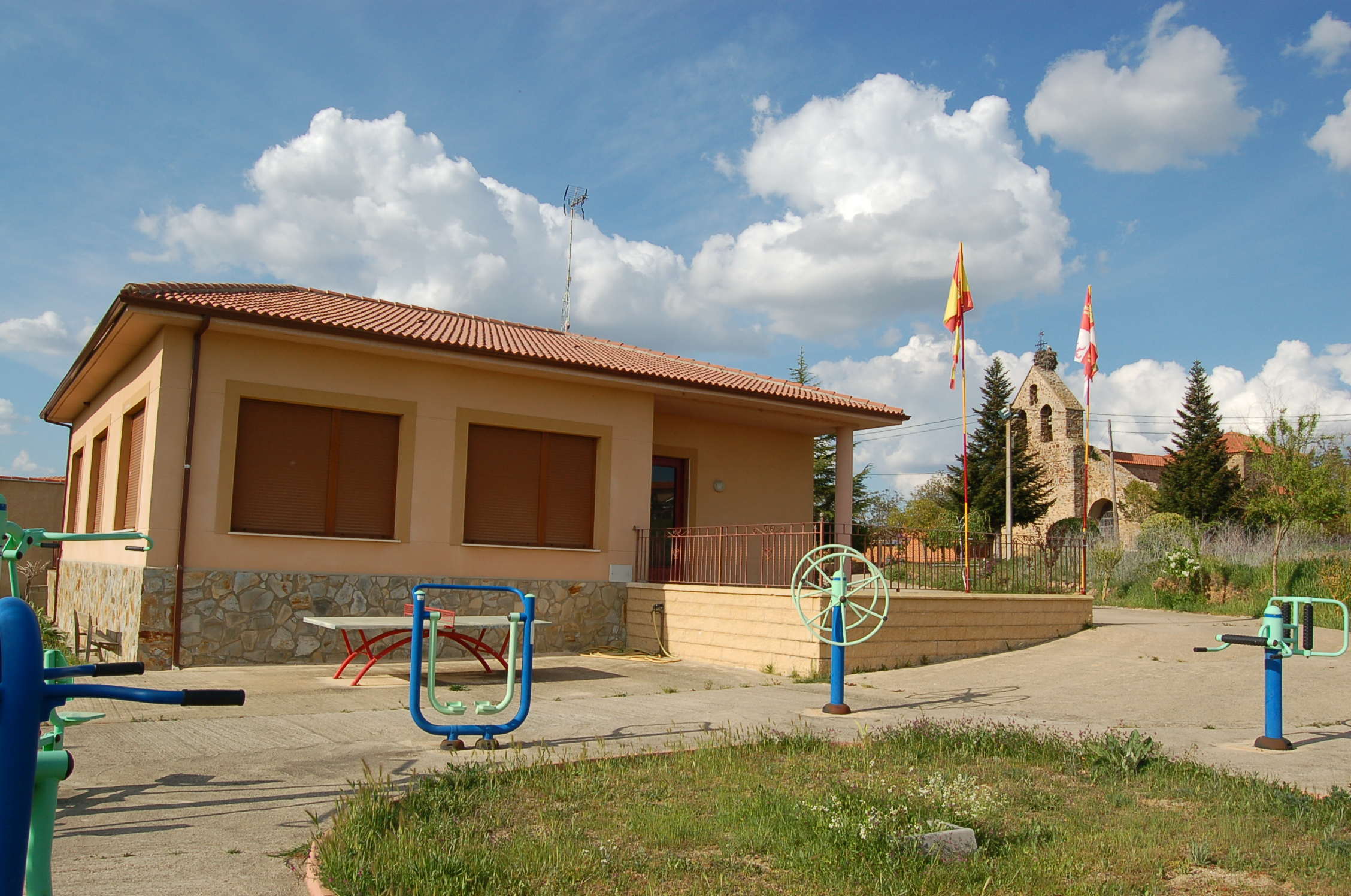 Local social en Mózar, coa igrexa ao fondo